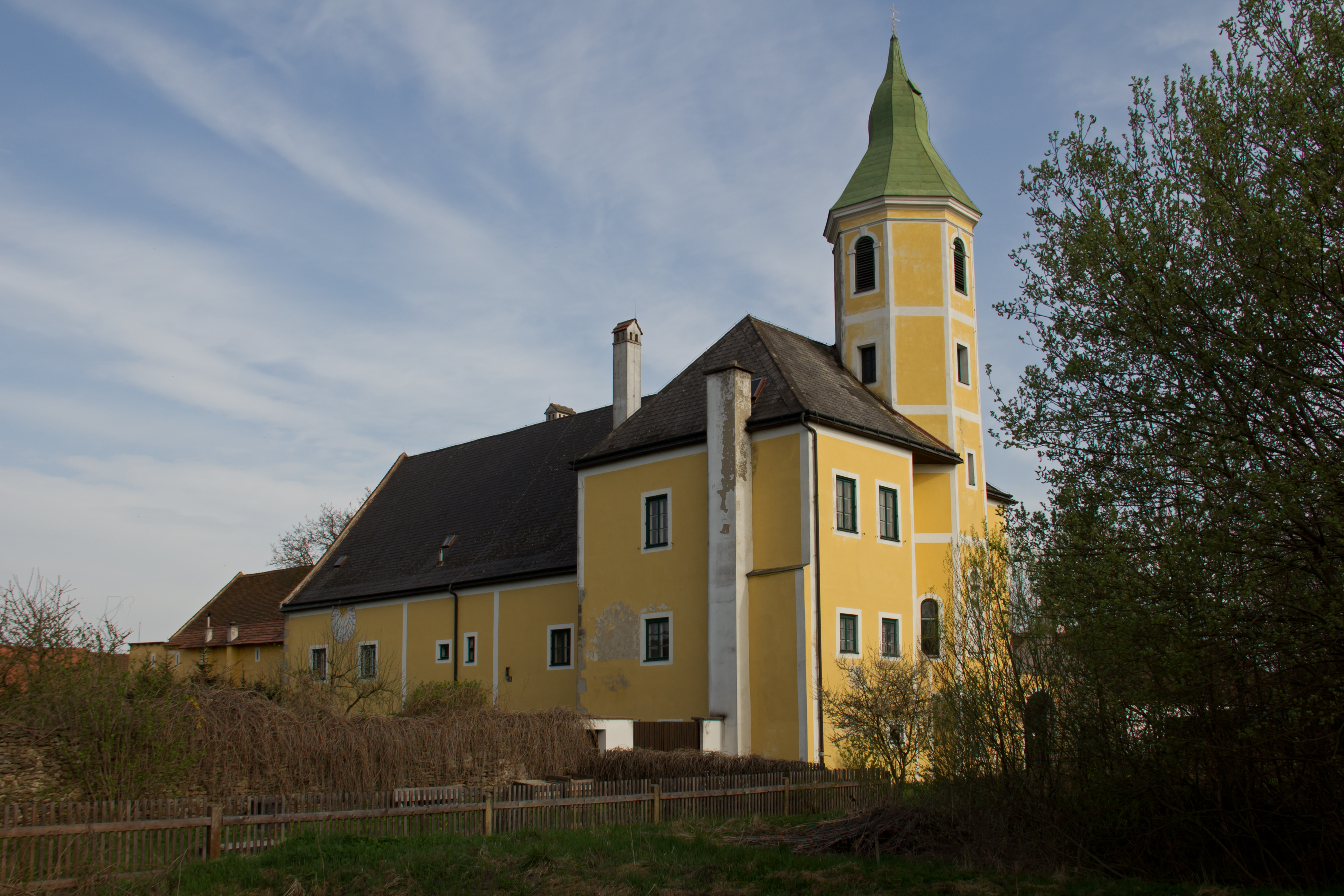 Der Gutshof Ratschenhof dient dem Stift Zwettl seit seiner Gründung im 12. Jahrhundert als Wirtschaftshof und wird heute als Forsthaus genutzt.